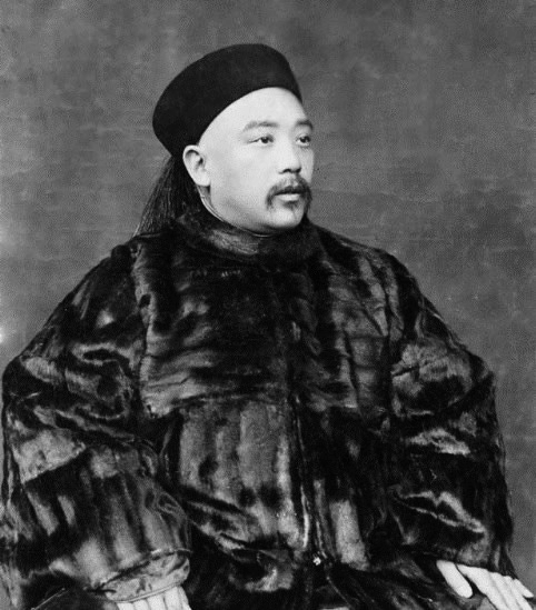 中文（中国大陆）: 1912年的袁世凯